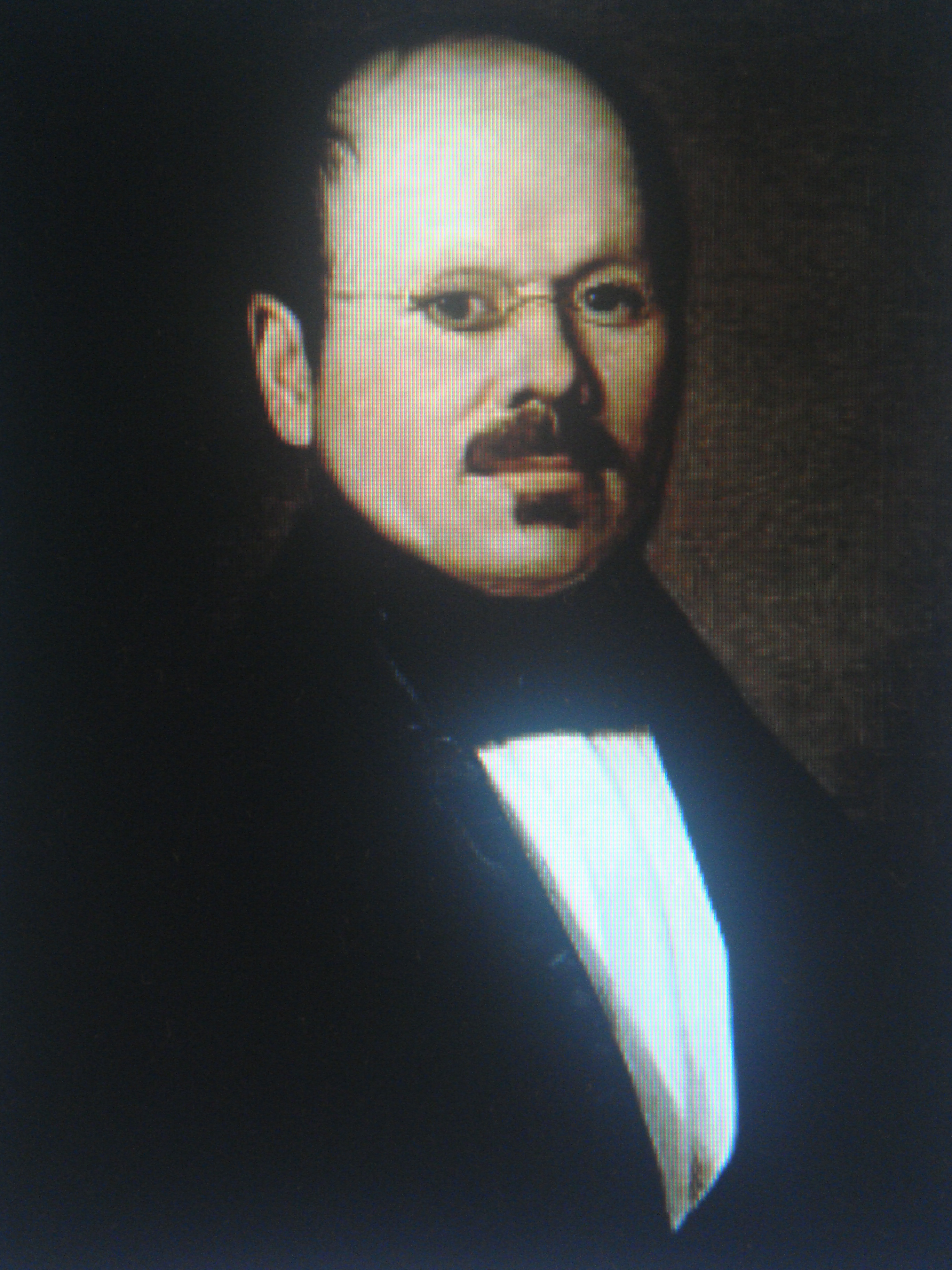 Retrato del politico e historiador español Antonio Benavides Fernández de Navarrete (1807-1884), que fue director de la Real Academia de la Historia.